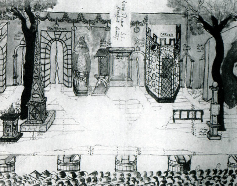 Historische Darstellung, Theater der Kölner Laurentianer Burse un 1581